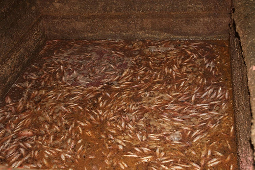 resortIMG_82540104